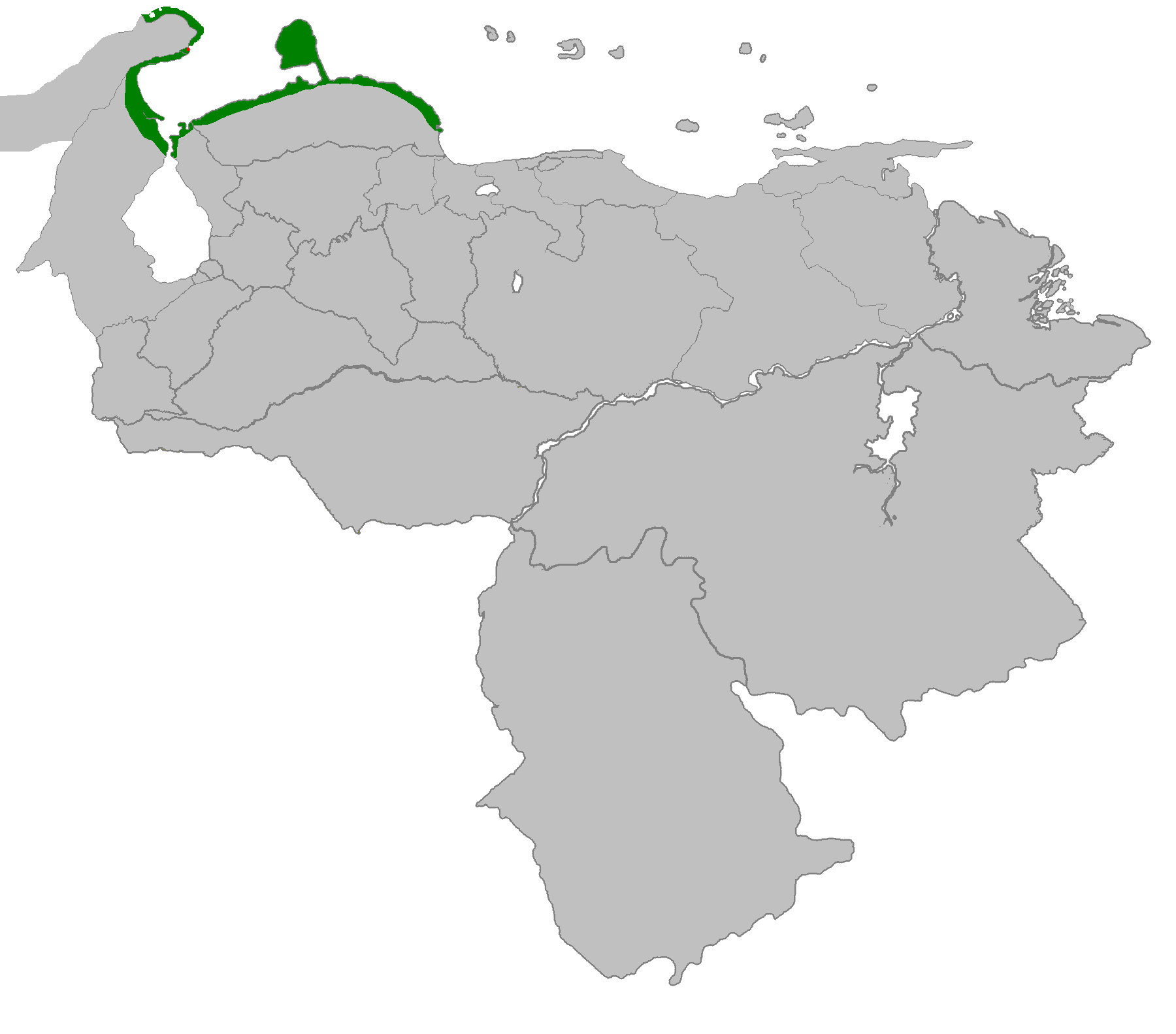 Mapa de la Gobernación de Coquibacoa